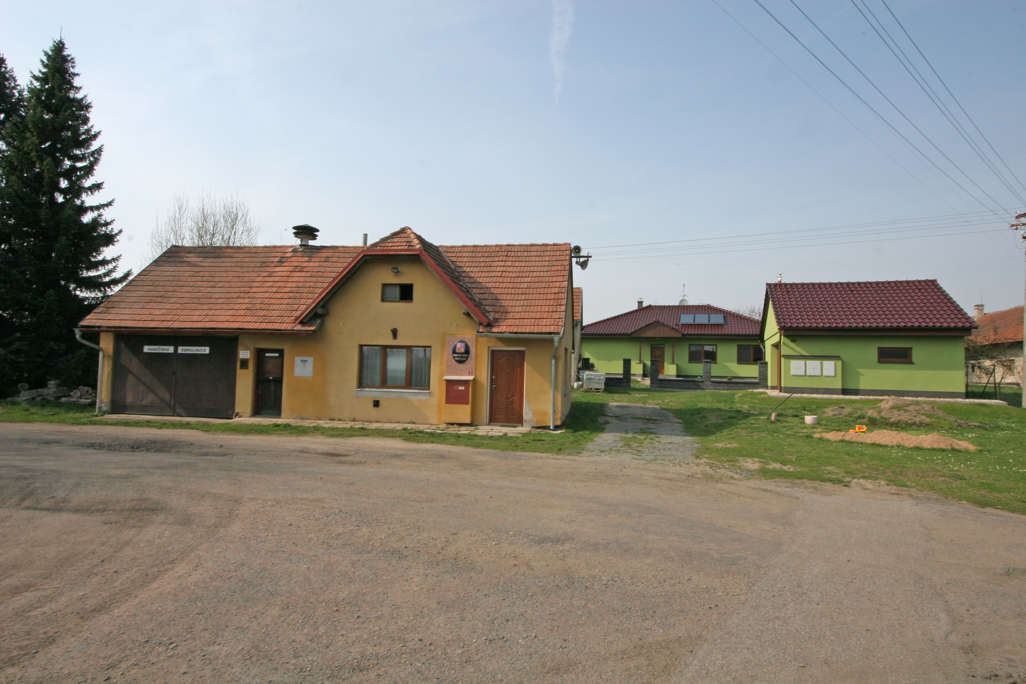 Přepychy obecní úřad